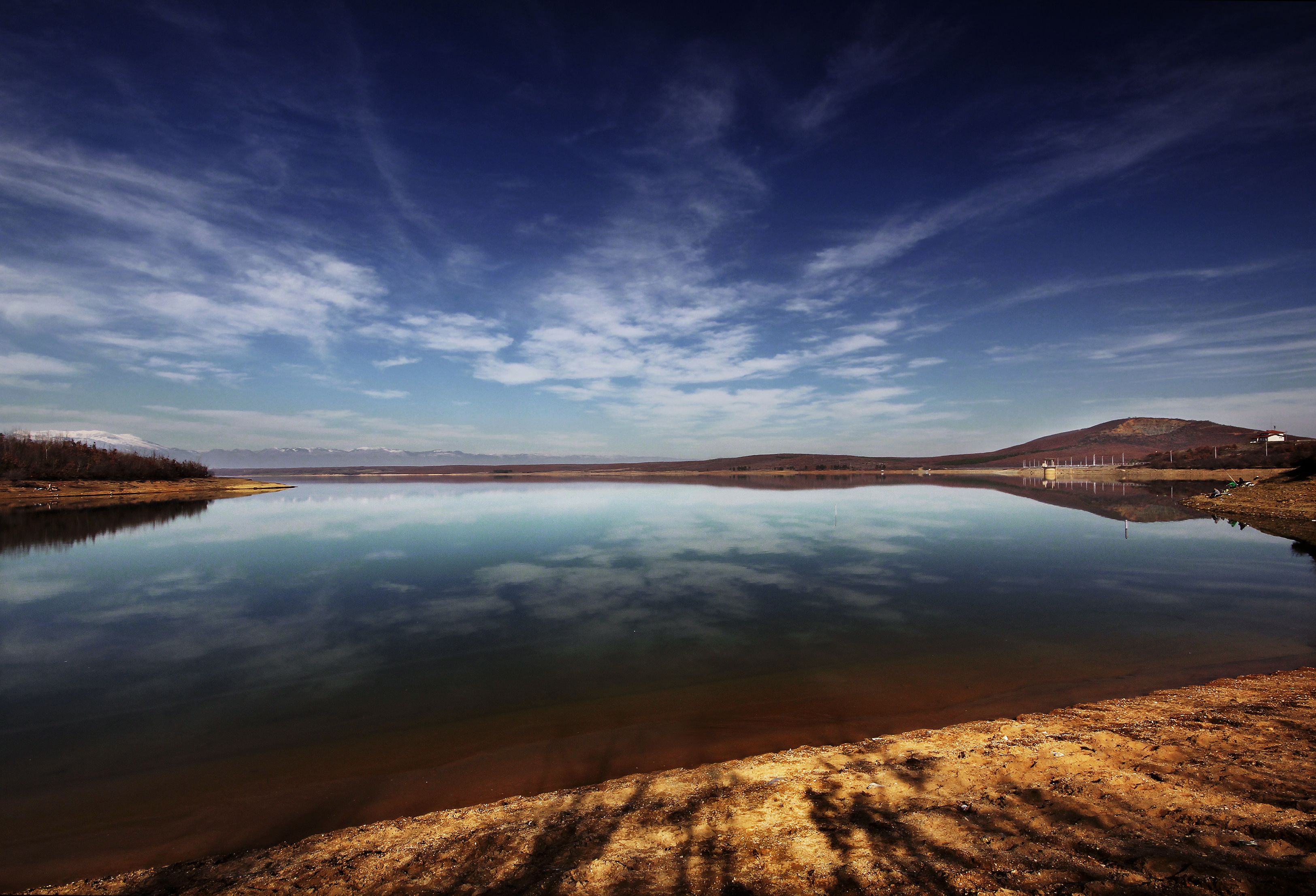 Liqeni i Radoniqit - Gjakove